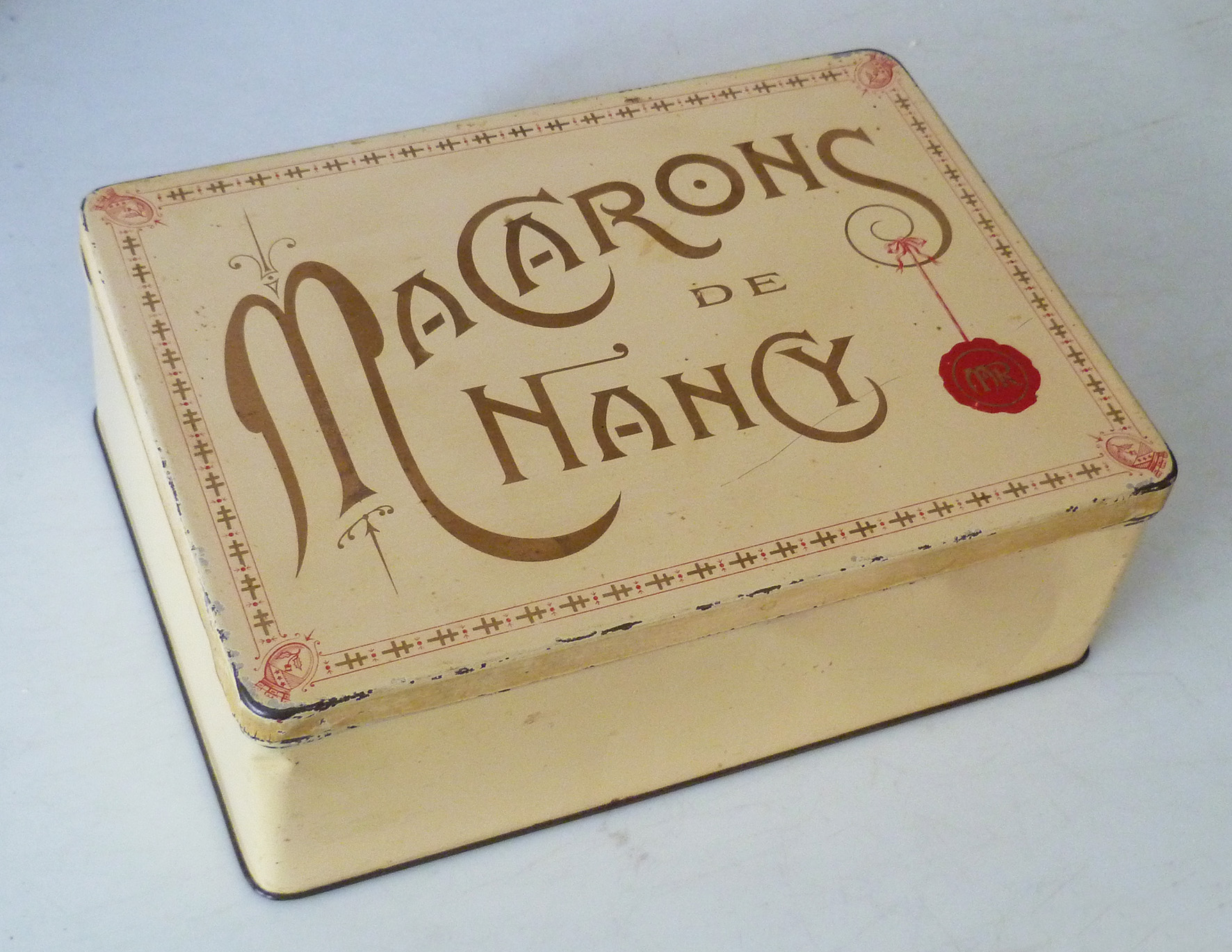 Boîte de macarons de Nancy des Magasins Réunis, vers 1920-1930